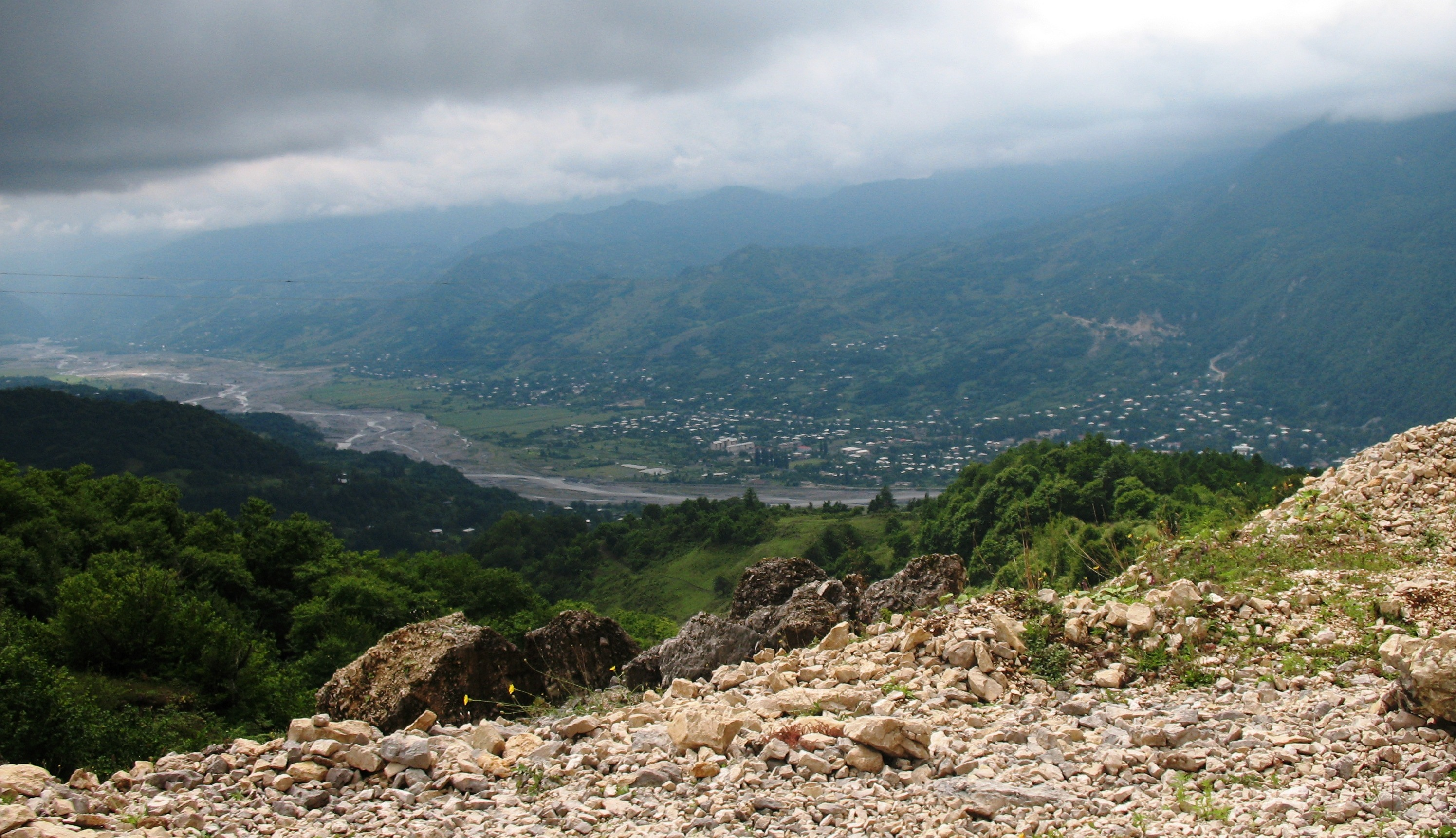 view to Tsageri